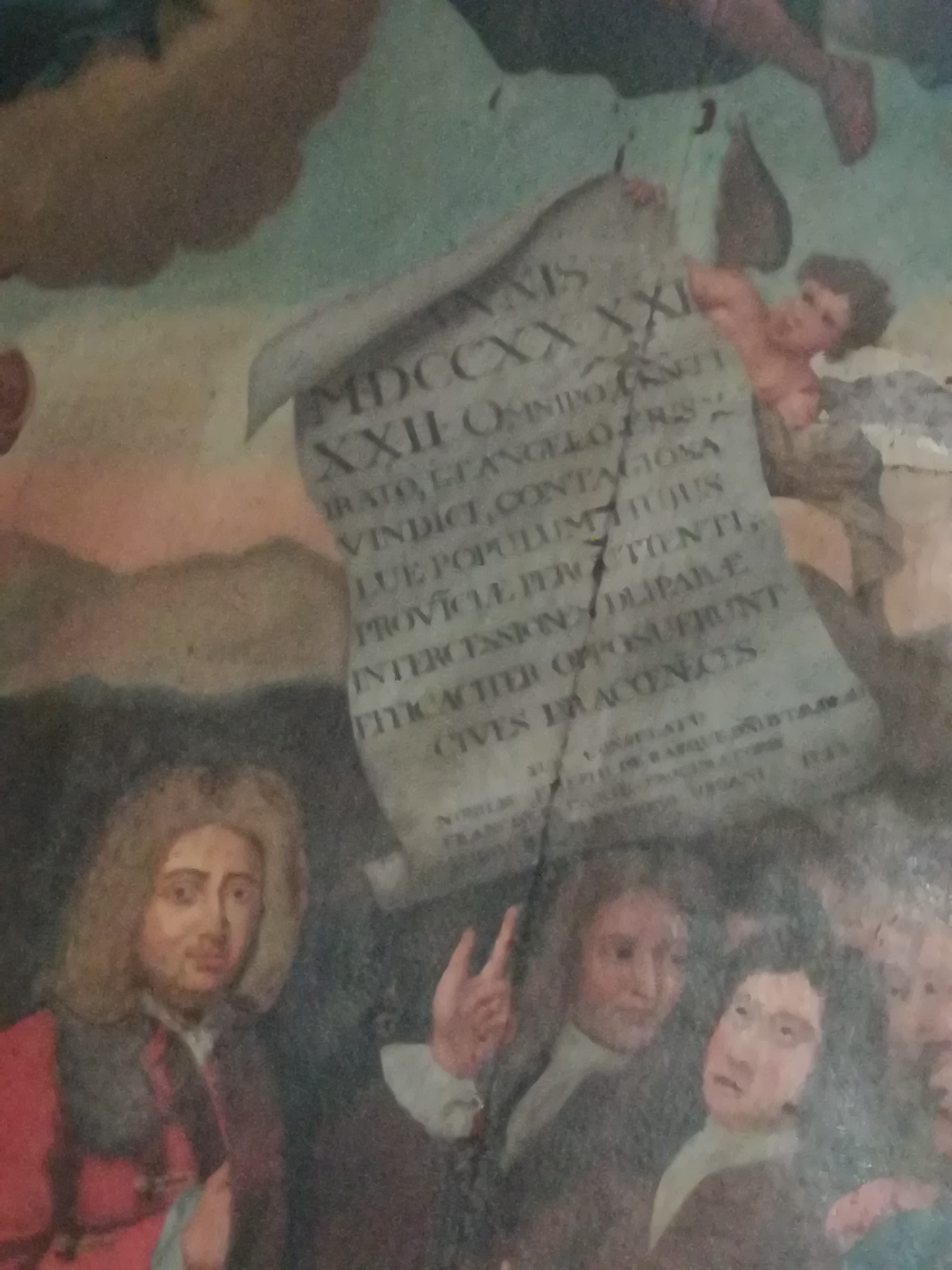 Extrait du tableau célébrant la protection de Notre Dame du Peuple lors des épidémies.